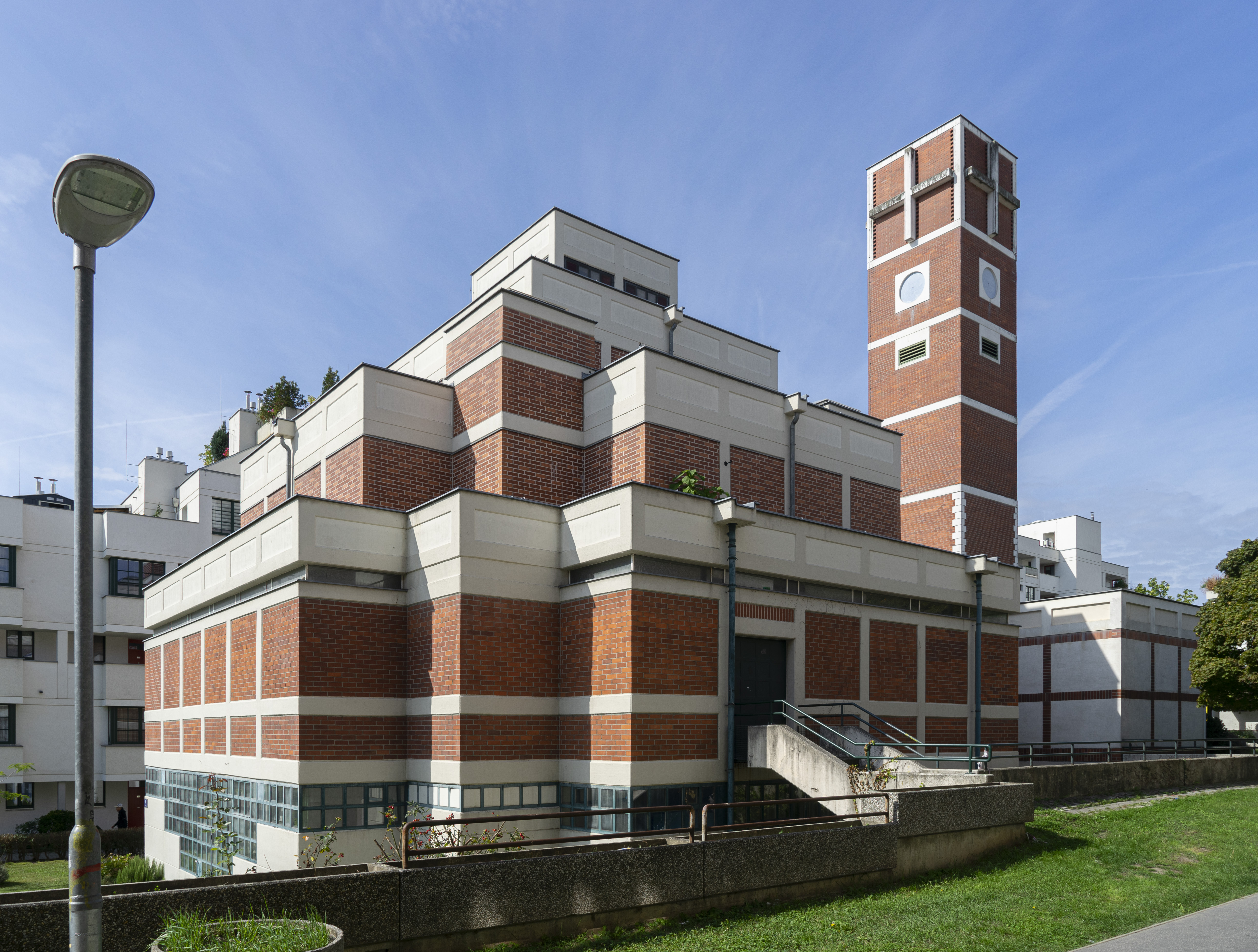 Kath. Pfarrkirche und Seelsorgezentrum Am Schöpfwerk hl. Franz von Assisi. Freistehender Campanile. Zugangsräume umgekehr gemustert.